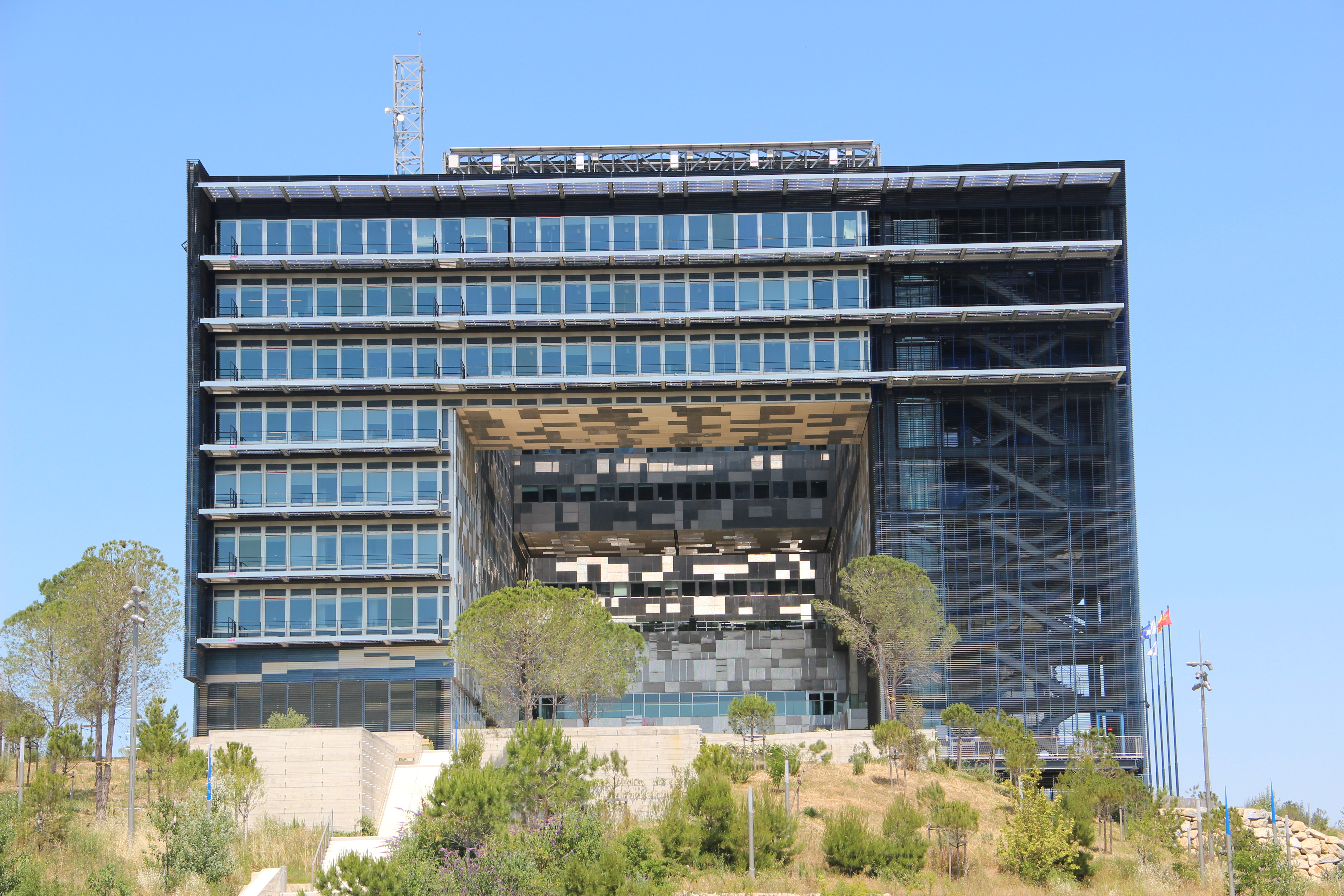 Hôtel de Ville